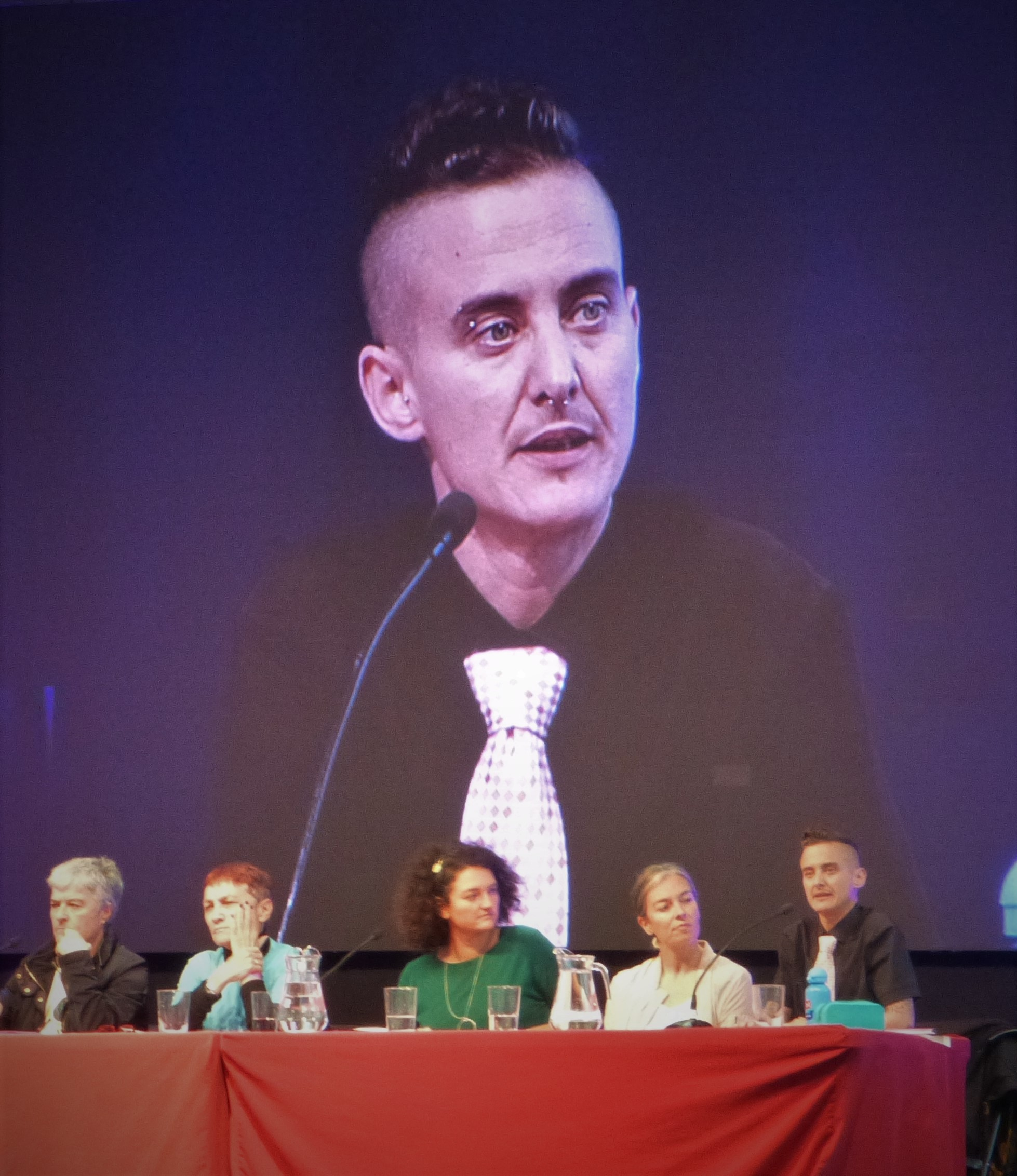 Josebe Iturrioz ekarpenak egiten EHko 5. Jardubaldi Feministetako 2. eguneko 2. mahai inguru zentralean.